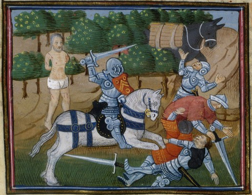 Gerreet secourant le vieux chevalier